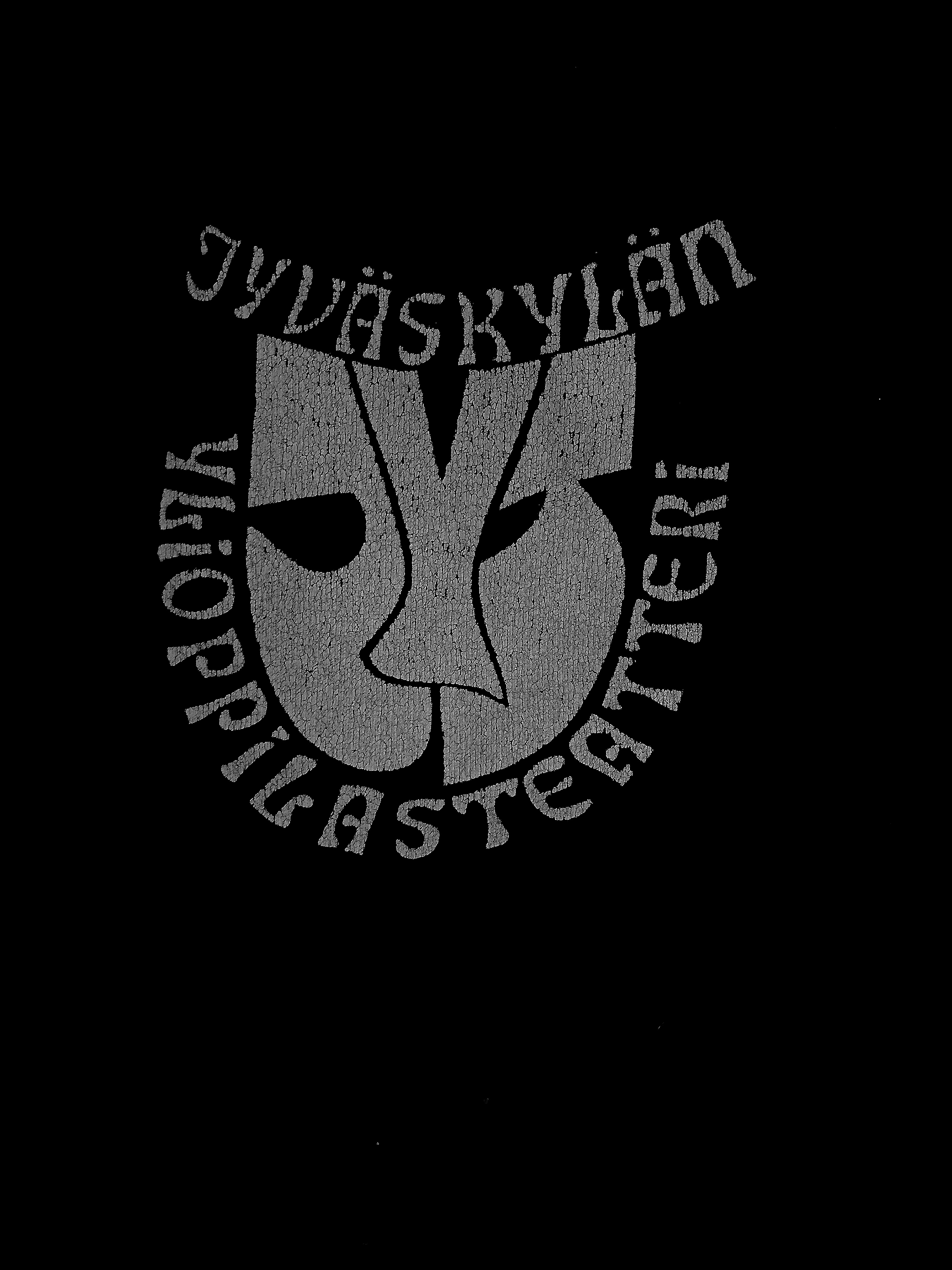 Jyväskylän ylioppilasteatterin logo teatterin jäsenhupparin selässä.